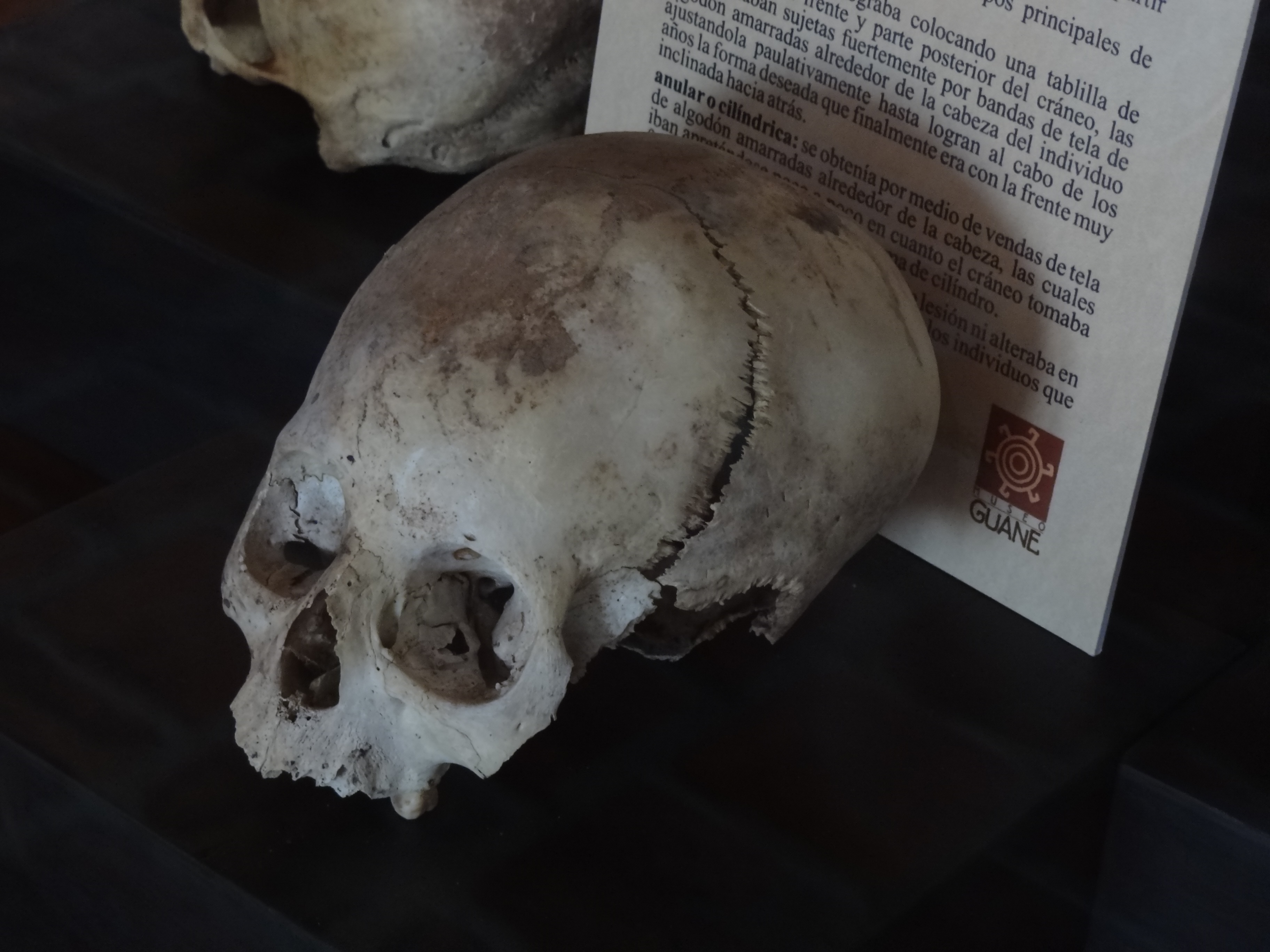 DCraneo de un individuo Guane con deformación intencional tabular oblicua, exhibido en el Parque Nacional del Chicamocha